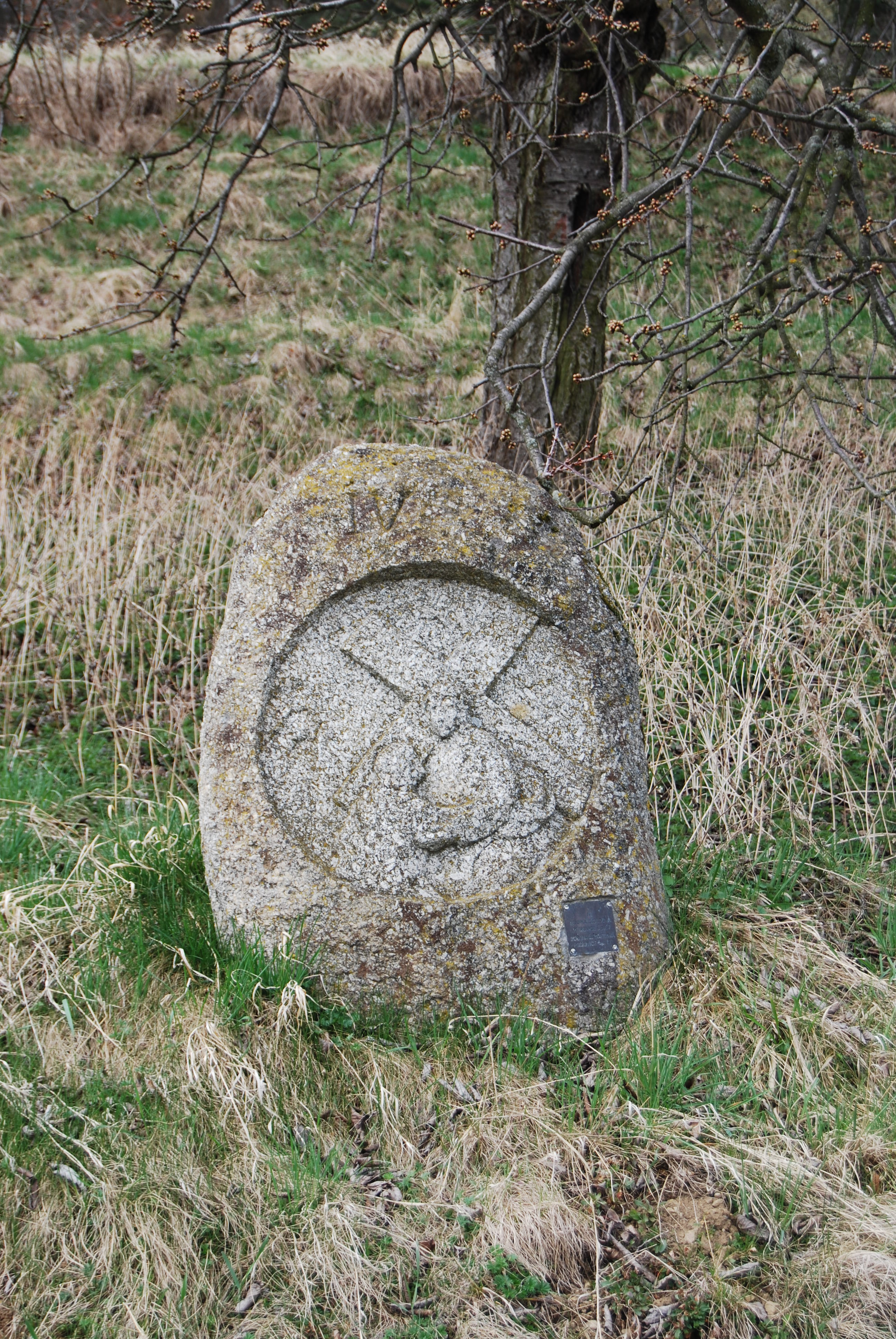 Jedno ze zastavení Křížové cesty. Kuníčko (Petrovice). Okres Příbram. Česká republika.